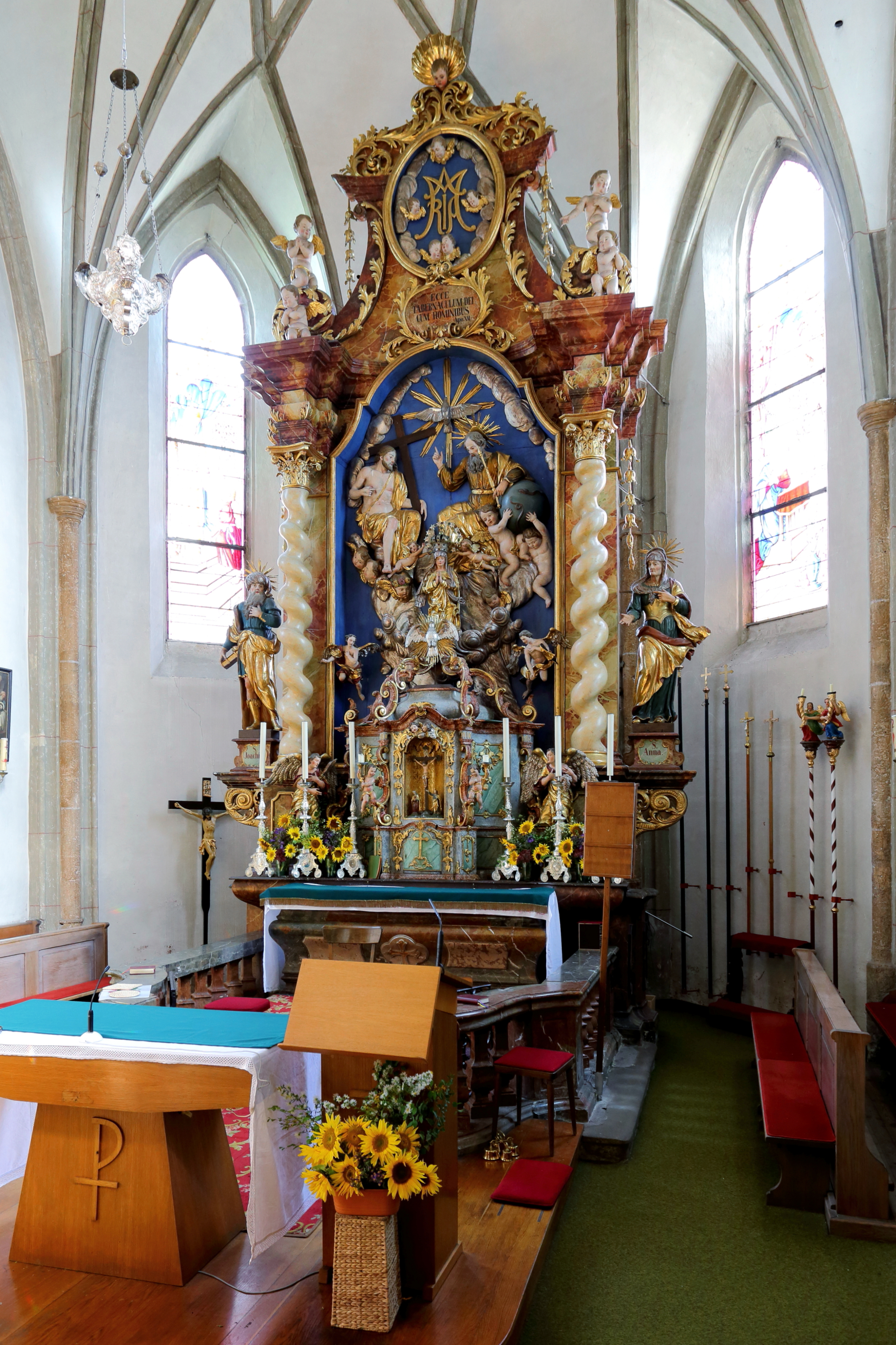 Hochaltar der katholischen Pfarrkirche Mariä Himmelfahrt in der oberösterreichischen Gemeinde Kirchdorf am Inn.